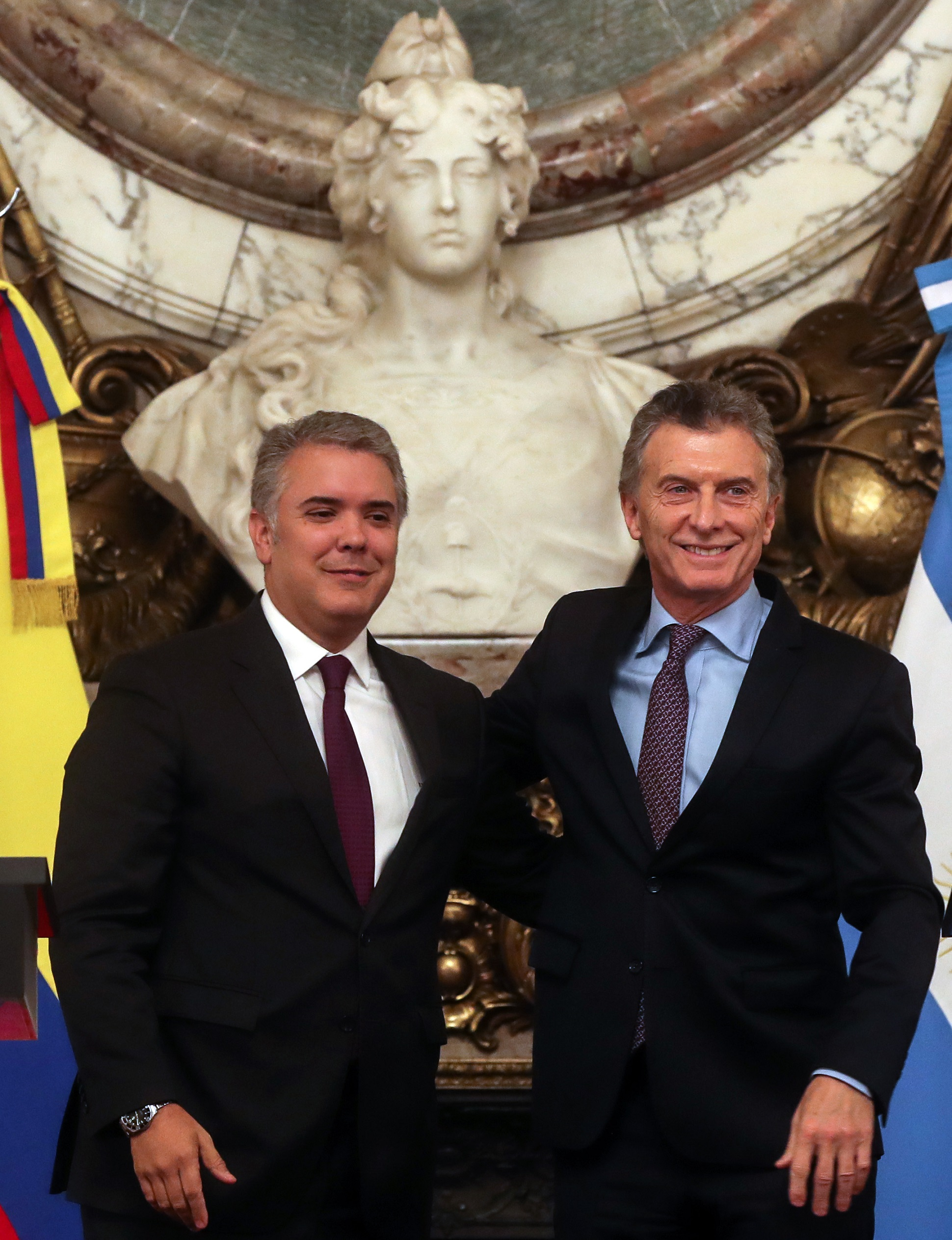 El presidente argentino y colombiano en 2019.